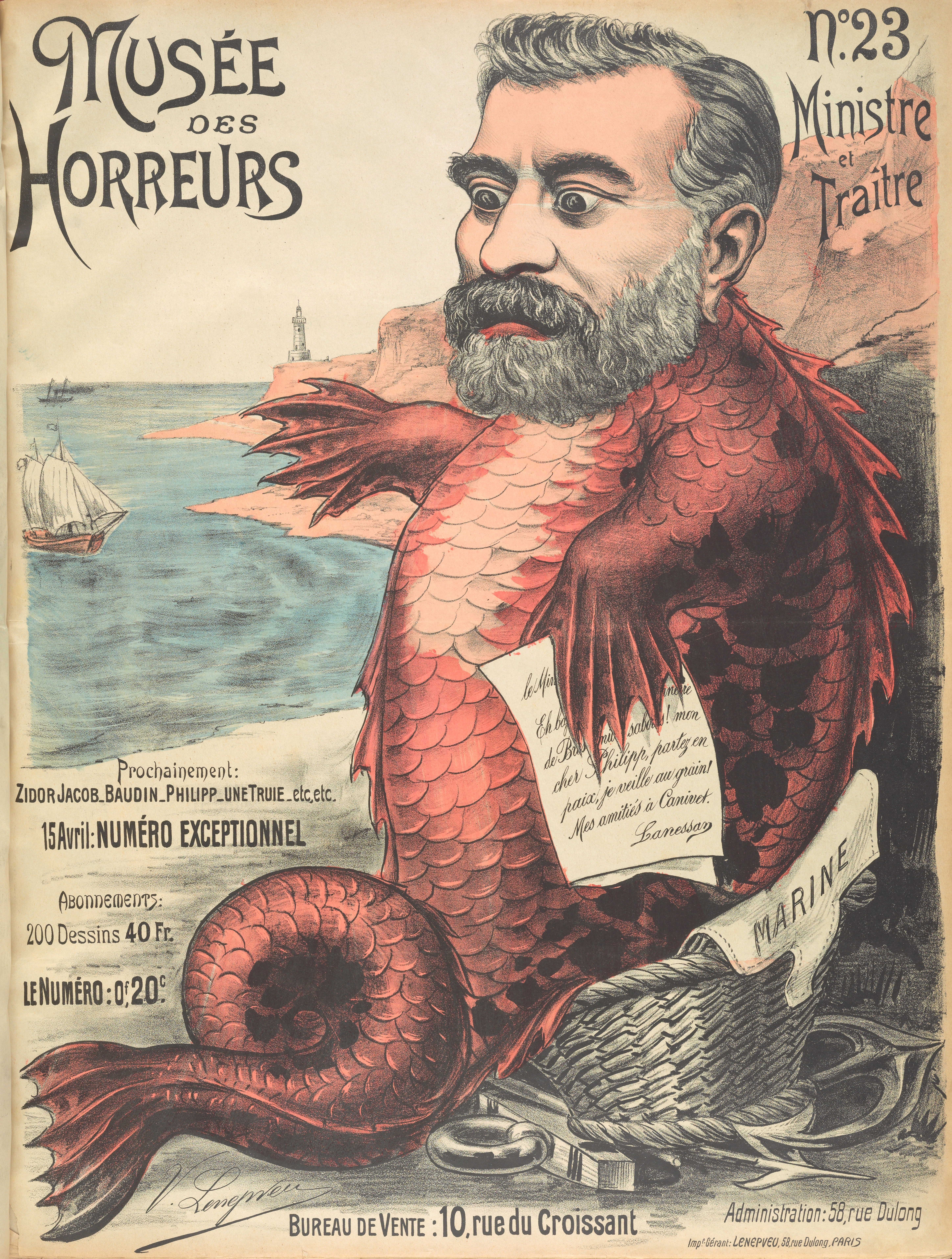 "Ministre et Traître".